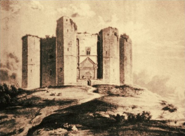 View of Castel del Monte